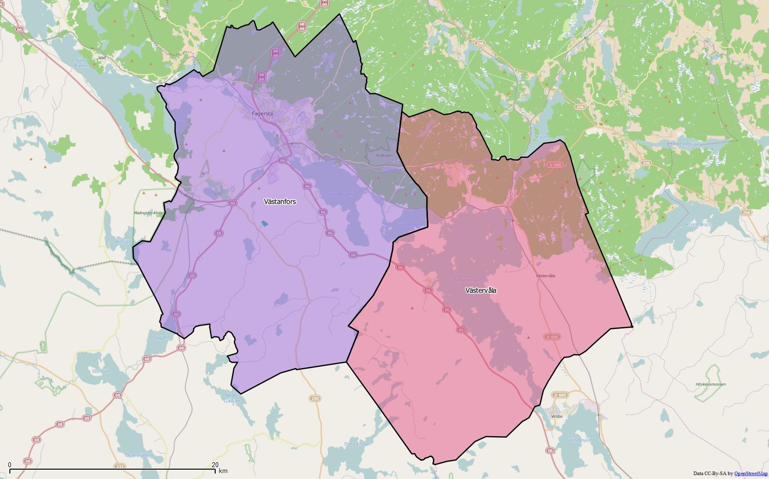 Distriktsindelningen i Fagersta kommun